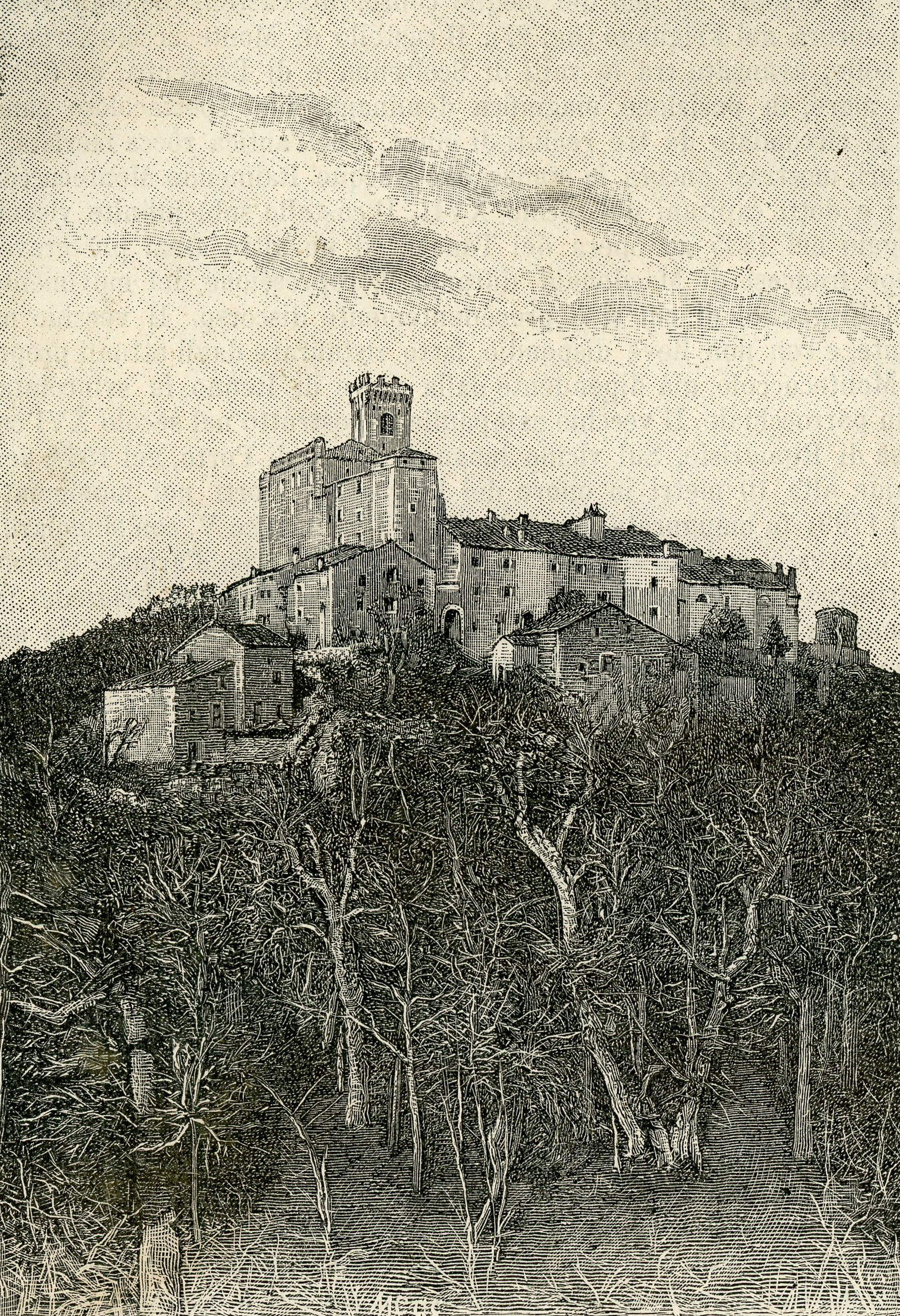 Pavullo nel Frignano: castello di Montecuccolo (xilografia di MCGS).